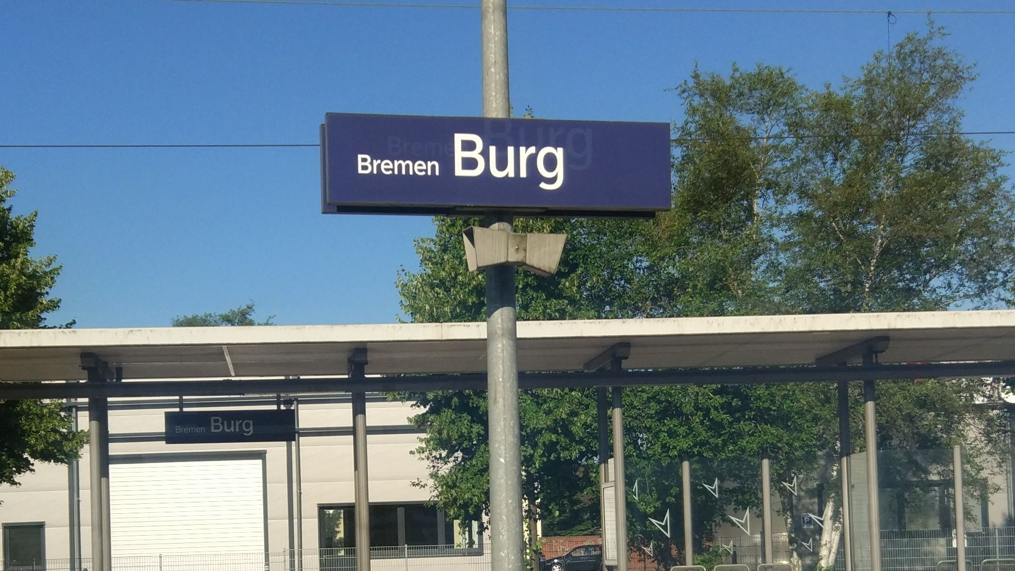 Bahnhofsschild Bremen Burg